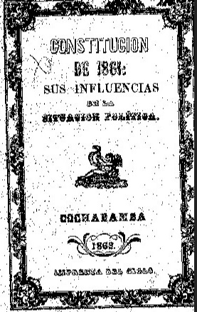 Portada de la publicacion del Dr. Jose Manuel de La Reza, sobre la influencia de la constitucion de 1861 de Bolivia sobre la situacion politica